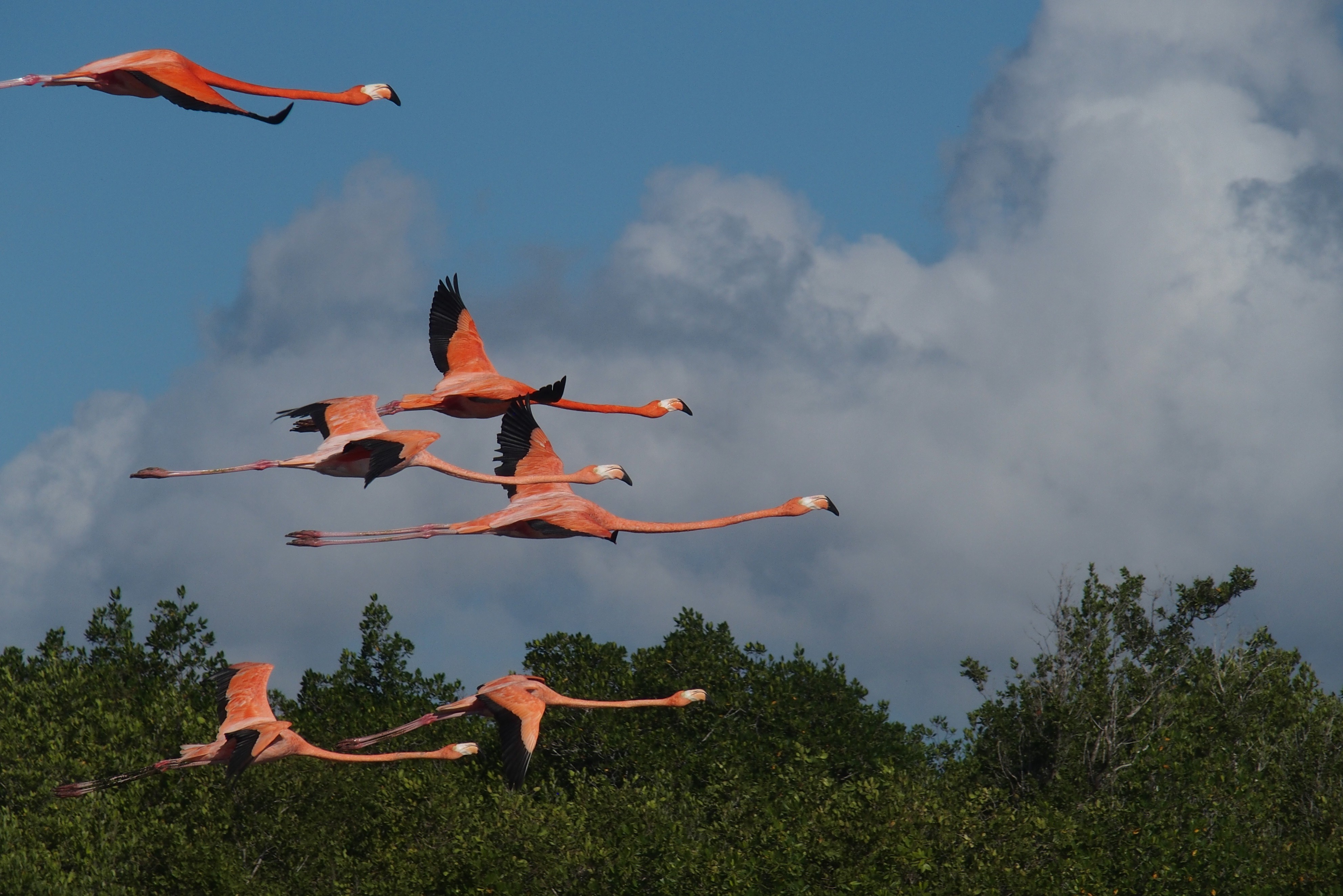 Kubaflamingos